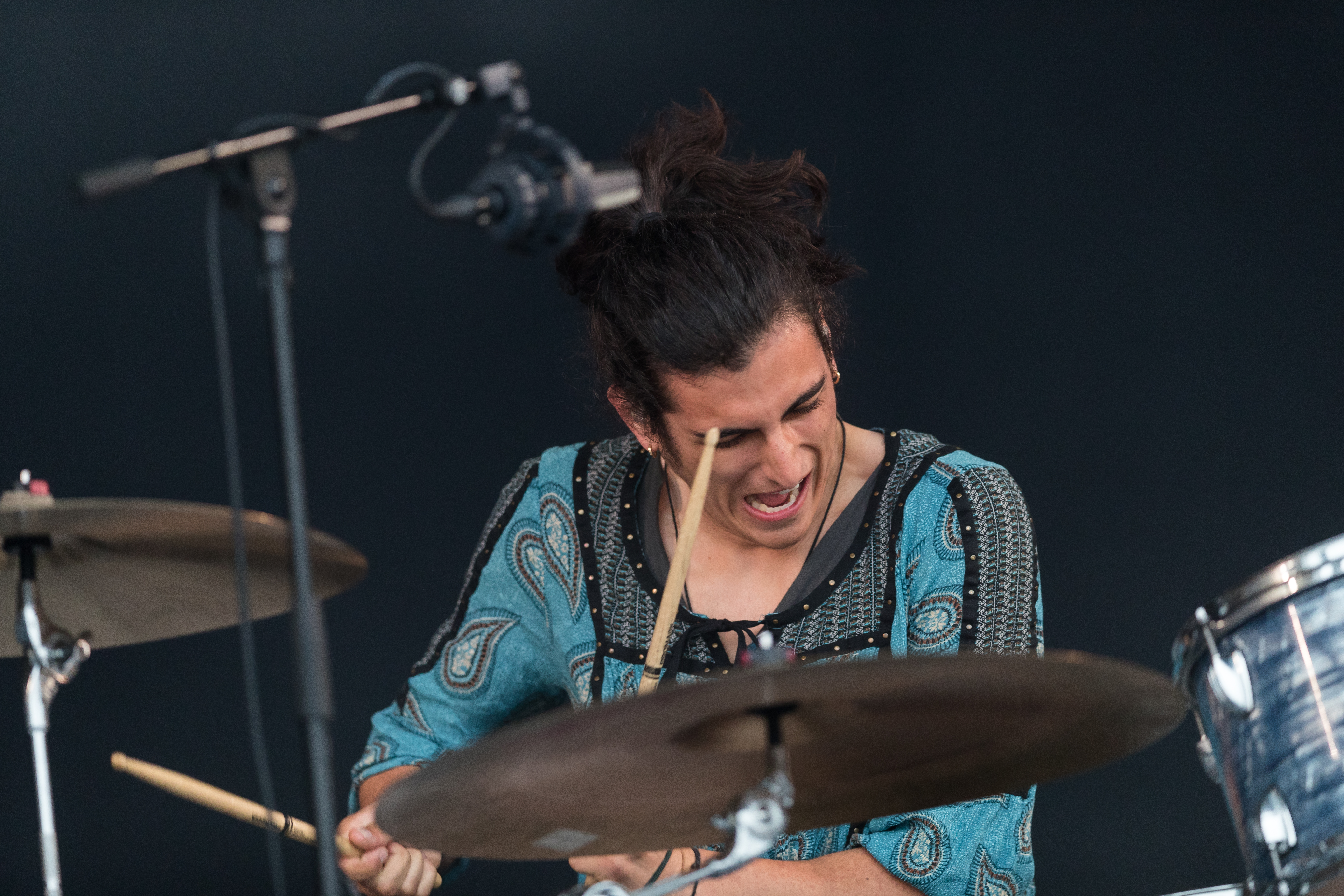 Greta van Fleet @ Rock am Ring 2018